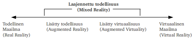 Milgramin virtuaalisen todellisuuden jatkumo